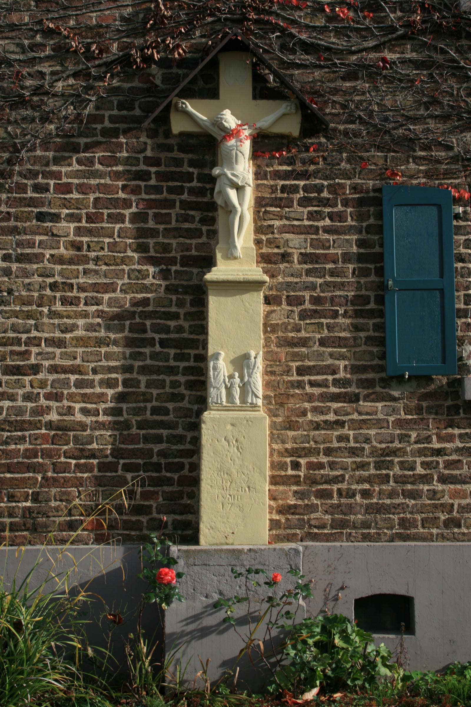 Das Wegekreuz am Haus Kurfürstenstr. 1 in Nörvenich-Eggersheim